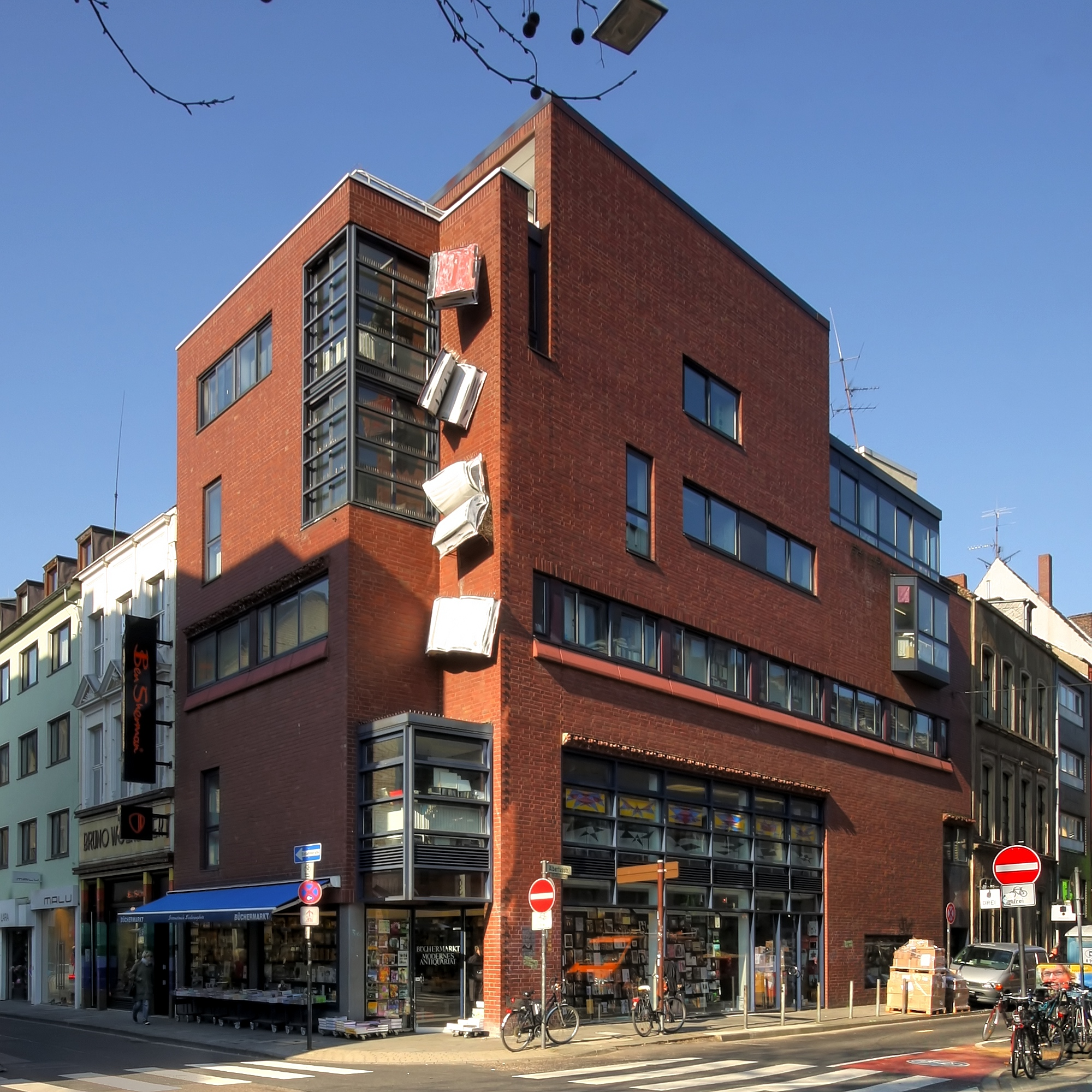 Verlagsbuchhandlung Walther König. Architekten: Hubertus von Allwörden und Gerhard Balser. Bauzeit: 1980/81. Details zur Skulptur siehe Abschnitt weiter unten.